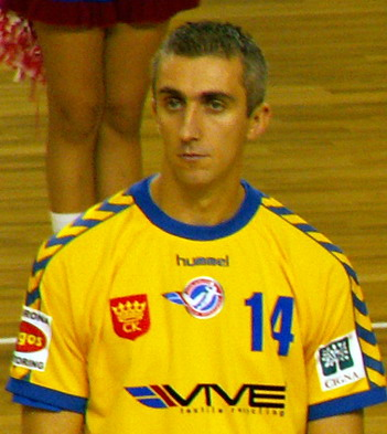 Mladen Čačič - Vive Kielce handball player